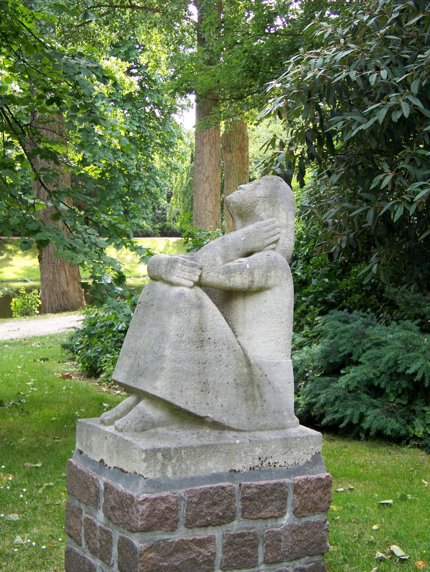 "Zonaanbidster" door Thees Meesters, Noorderplantsoen, Groningen (NL)